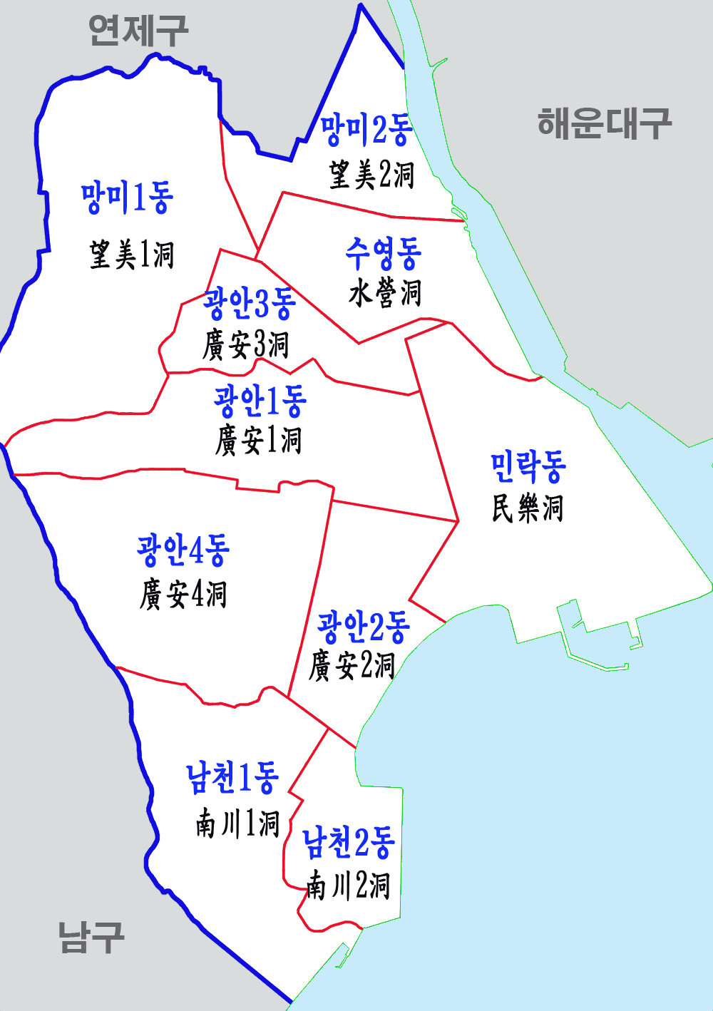 부산시 수영구 행정구역도